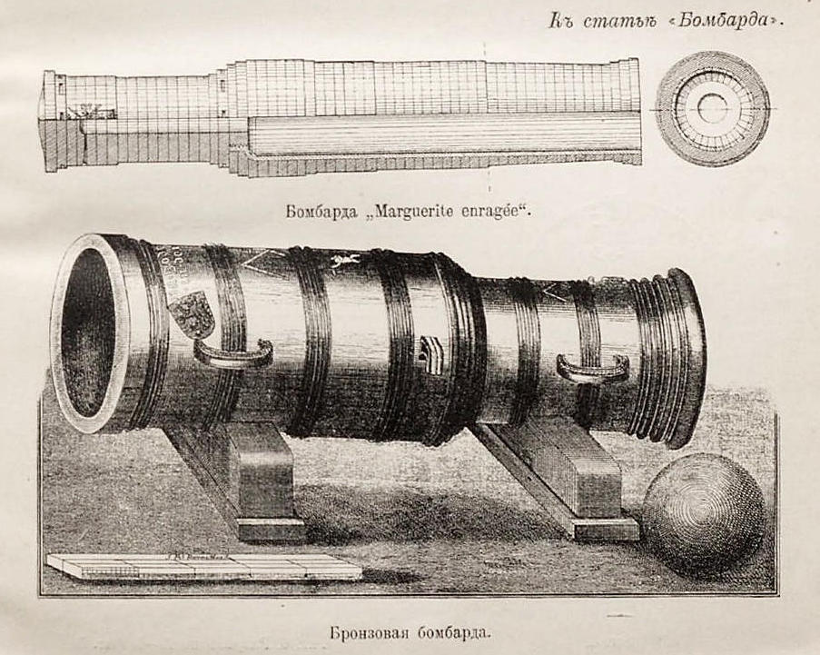 Данное изображение было использовано в статье «Бомбарда» опубликованной в пятом томе «Военной энциклопедии», который был издан книгоиздательским товариществом Ивана Дмитриевича Сытина в 1911 году в столице Российской империи городе Санкт-Петербурге.